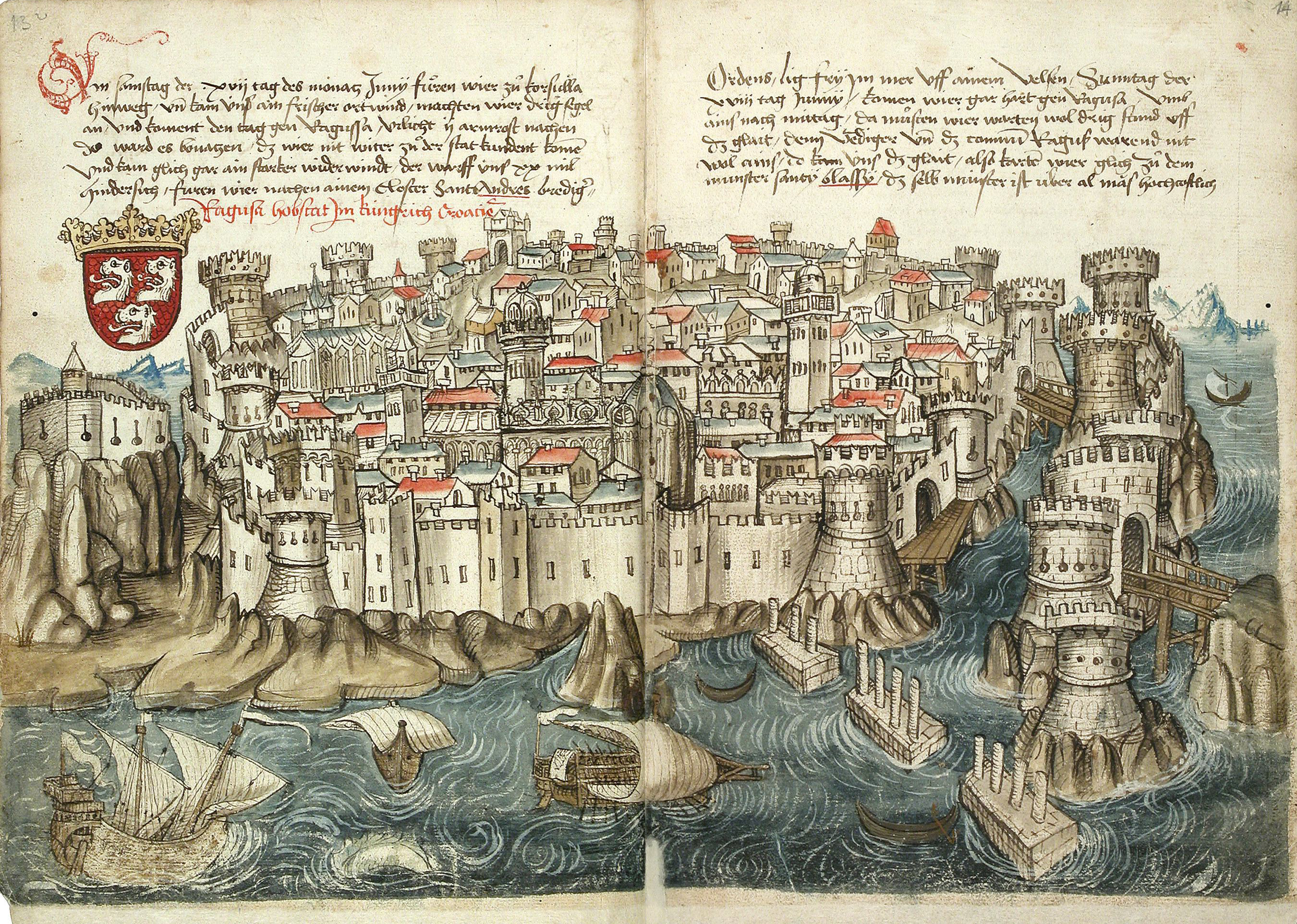 Doppelseite, aus Conrad Grünenberg: Beschreibung der Reise von Konstanz nach Jerusalem. Bodenseegebiet, um 1487. Badische Landesbibliothek Karlsruhe, Cod. St. Peter, pap. 32.